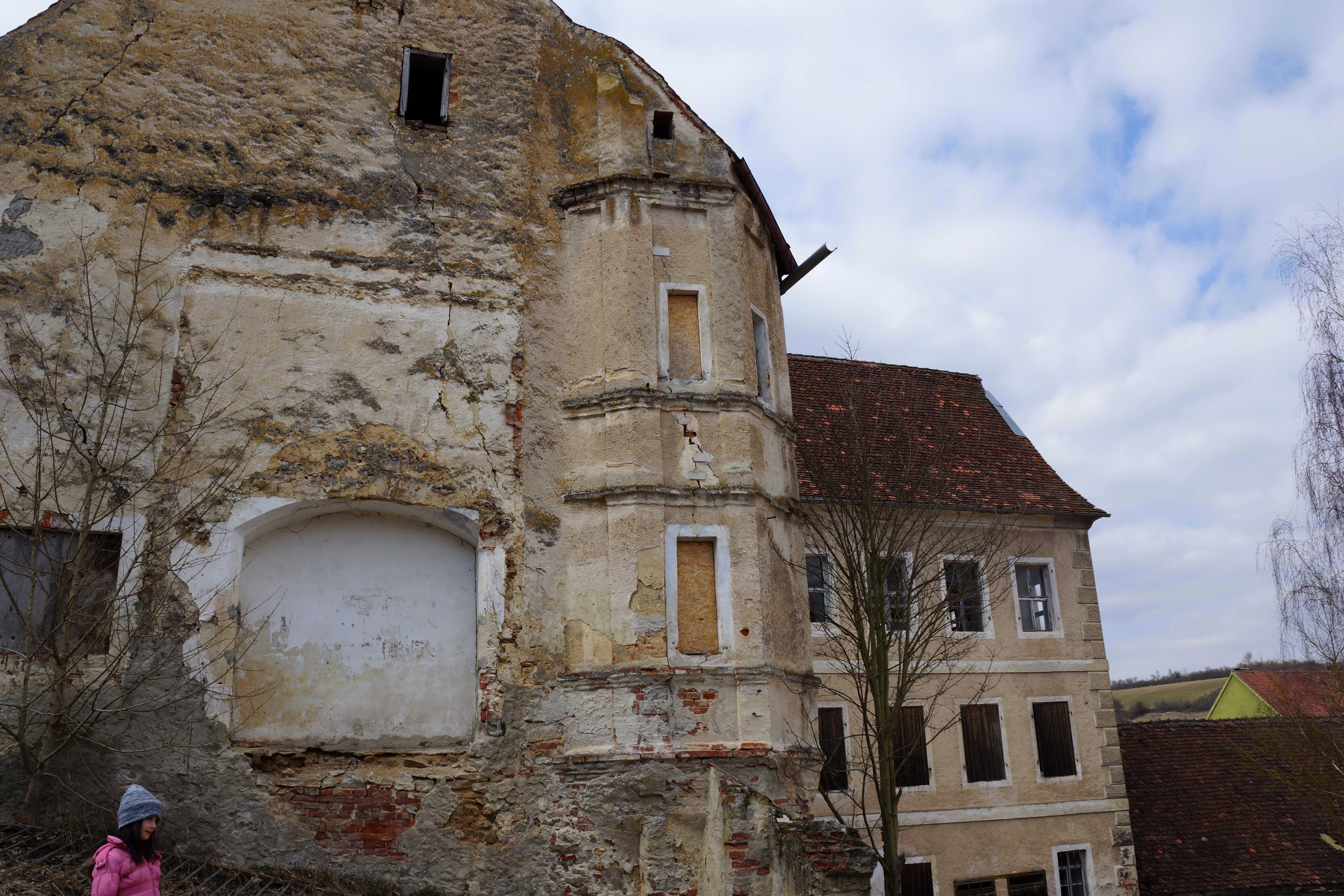 Der sogenannte Pfleghof in Hohenburg im Lauterachtal